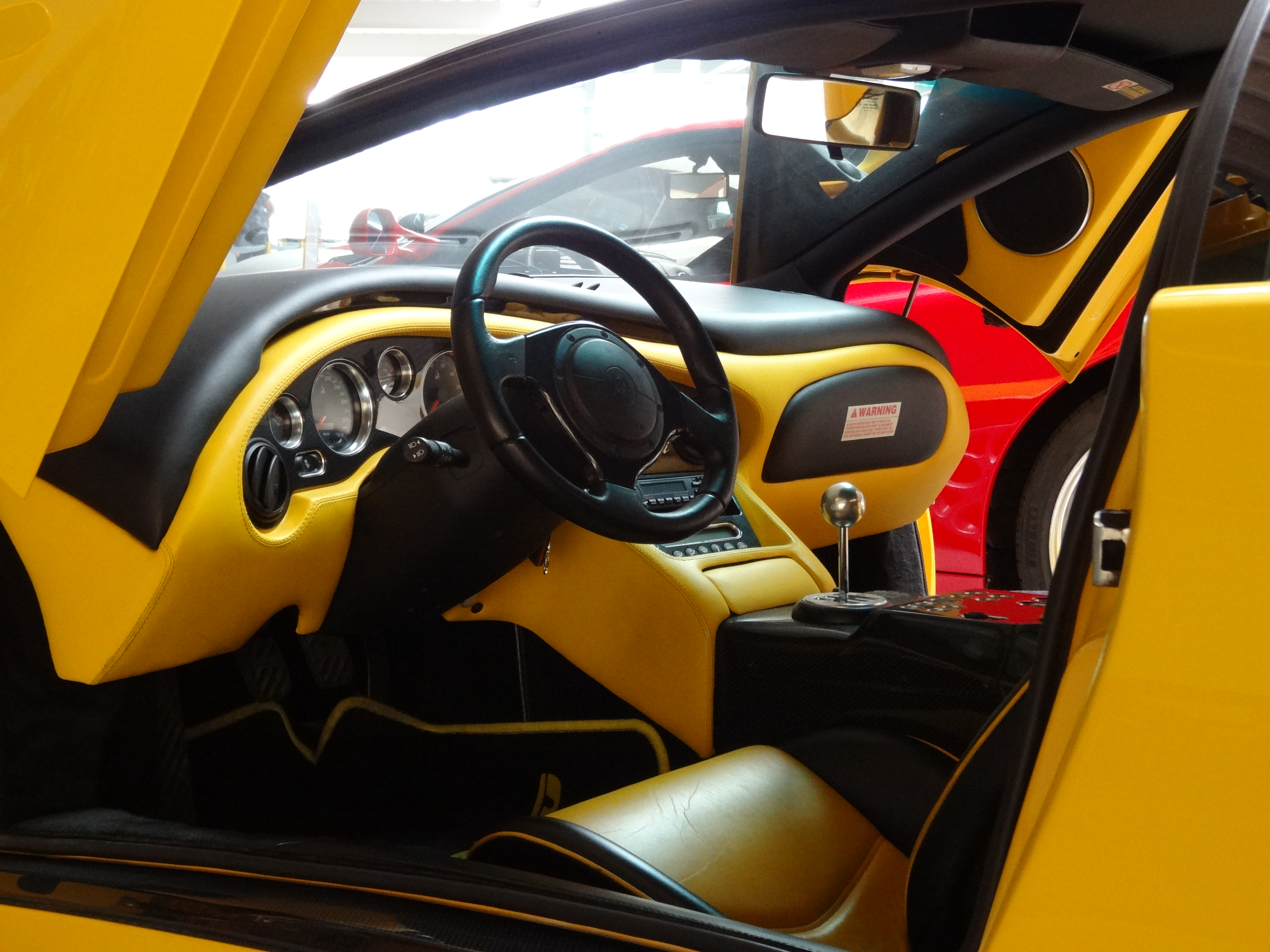 Autosammlung Steim - Schramberg 090 Lamborghini Diablo VT